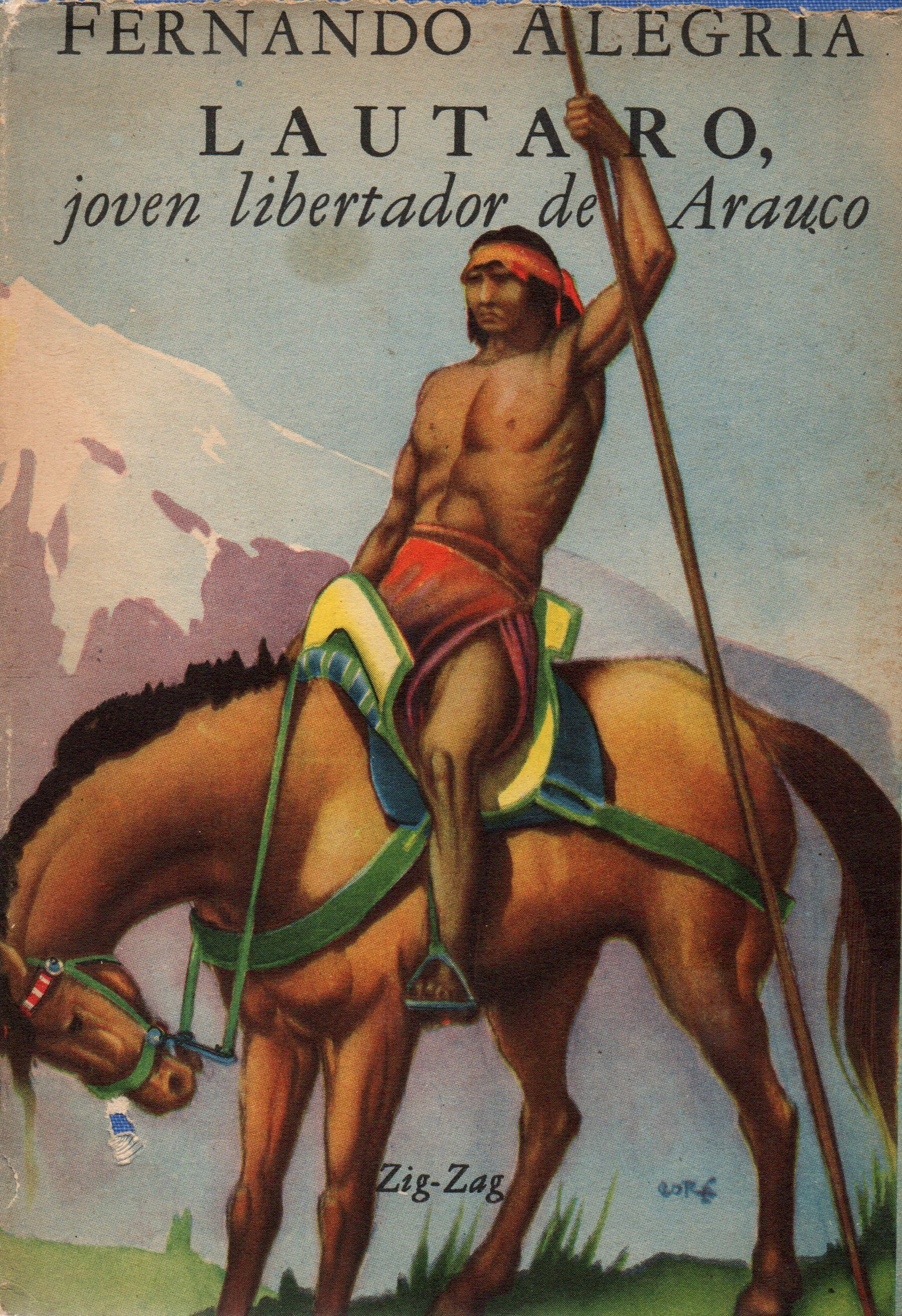 Portada del libro Lautaro, joven libertador de Arauco. Fernando Alegría. Santiago : Zig-Zag, 1943. 238 páginas